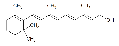 Molécule de Retinol (Vitamine A)